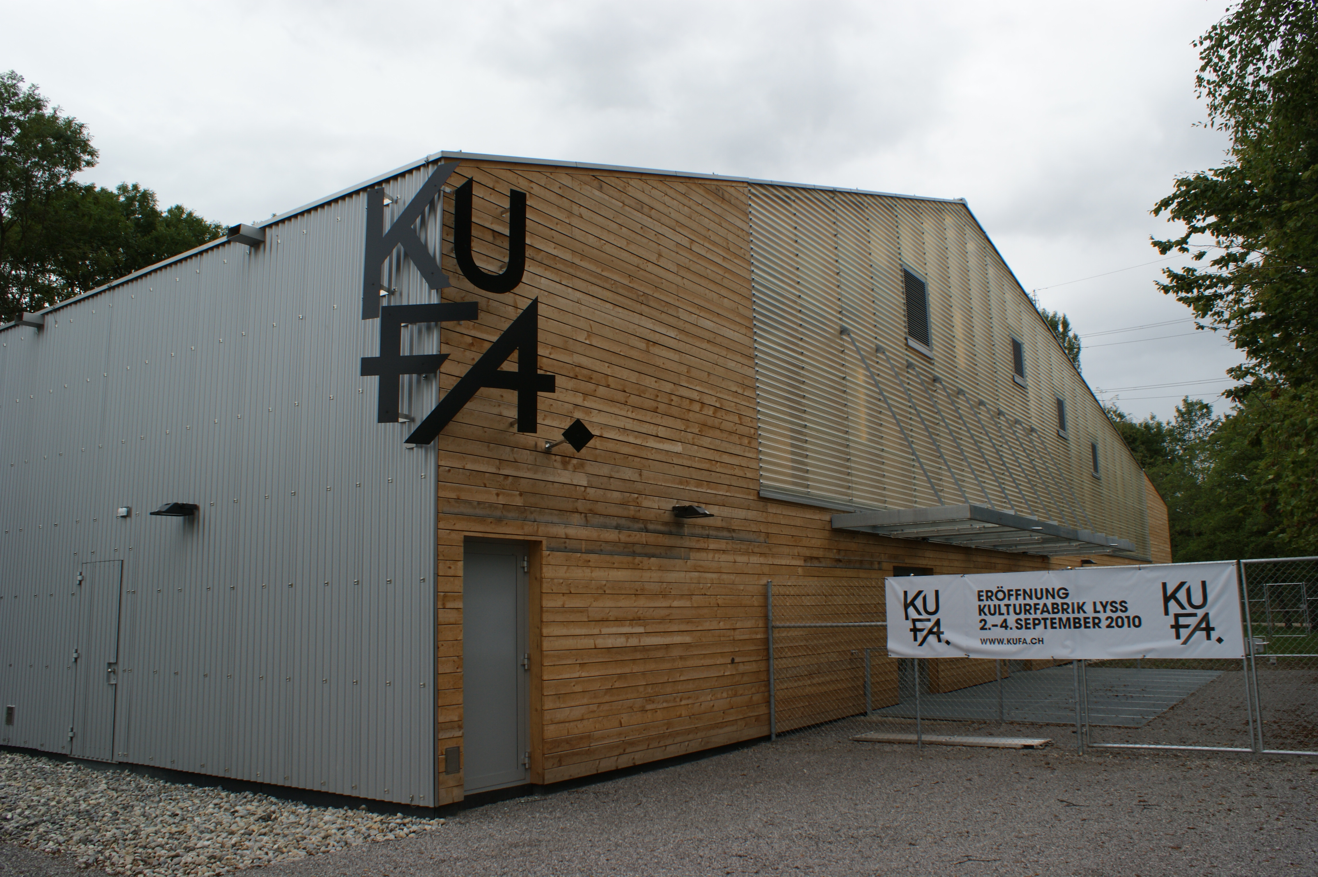 Das Gebäude der neuen Kulturfabrik vor der Neueröffnung.